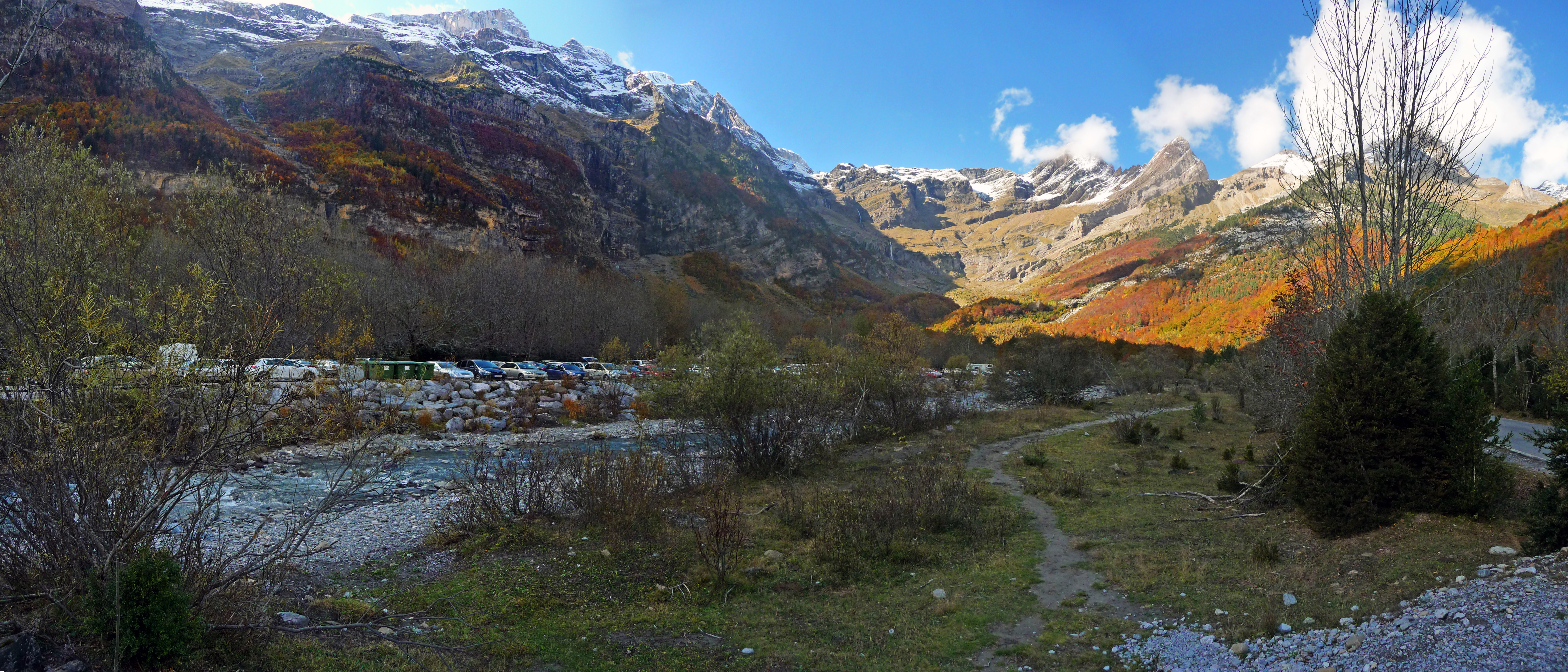 Fotografía panorámica realizada en octubre del 2011 en el Valle de Pineta, en el Parque nacional de Ordesa y Monte Perdido.